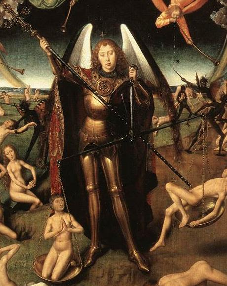 crop of File:MemlingJudgementOpen.jpg